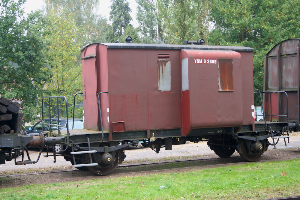 VSM goederentrein-bagagewagen Dg 2698 te Beekbergen. Foto: Erik Swierstra.